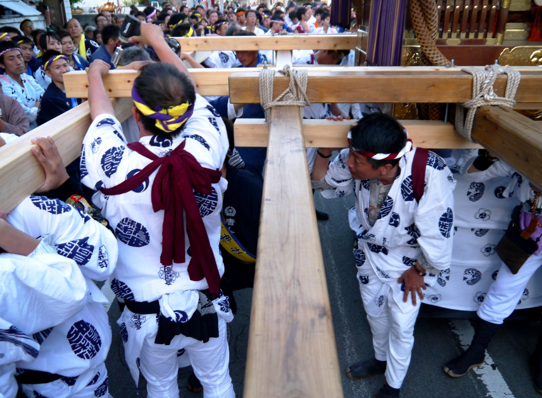 いつもは4点棒の小田原：松原神社の本社神輿。6点棒にするため装着された棒（柱）を外す作業。宮入り前に行われ、5分程で取り外し作業が完了した。